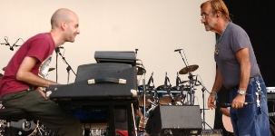 William Bottin & Lucio Dalla